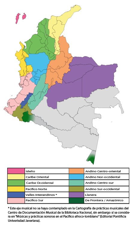 Ejes musicales de Colombia